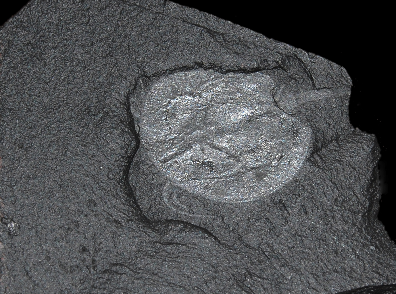 Naturhistorisches Museum Wien